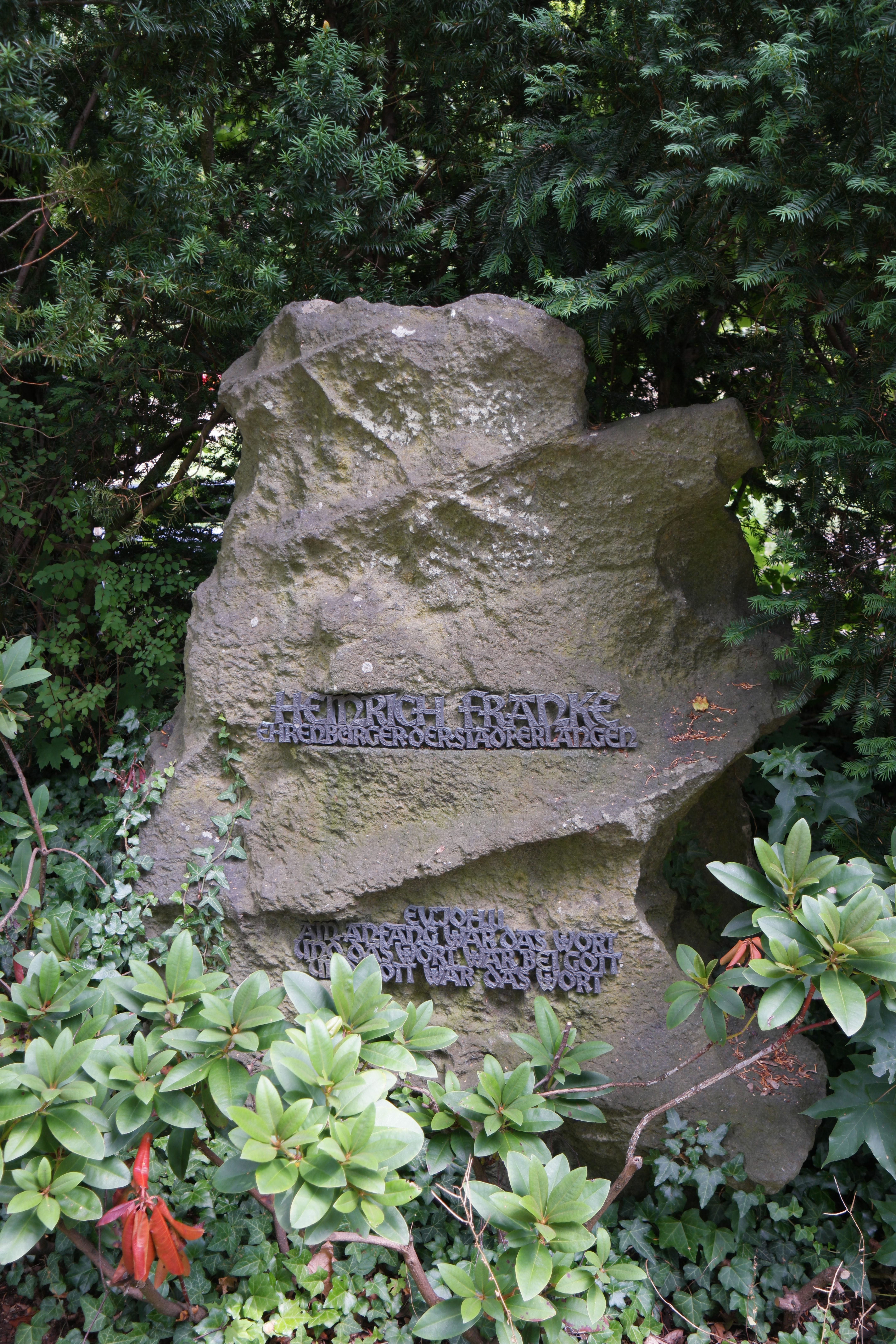 Grab des Physikers und SPD-Politikers Heinrich Franke, 1887-1966, auf dem Zentralfriedhof in Erlangen